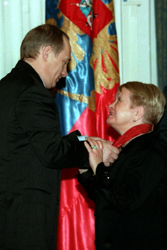 МОСКВА, КРЕМЛЬ. Церемония вручения государственных наград. Орден «За заслуги перед Отечеством» II степени вручен композитору Александре Пахмутовой.